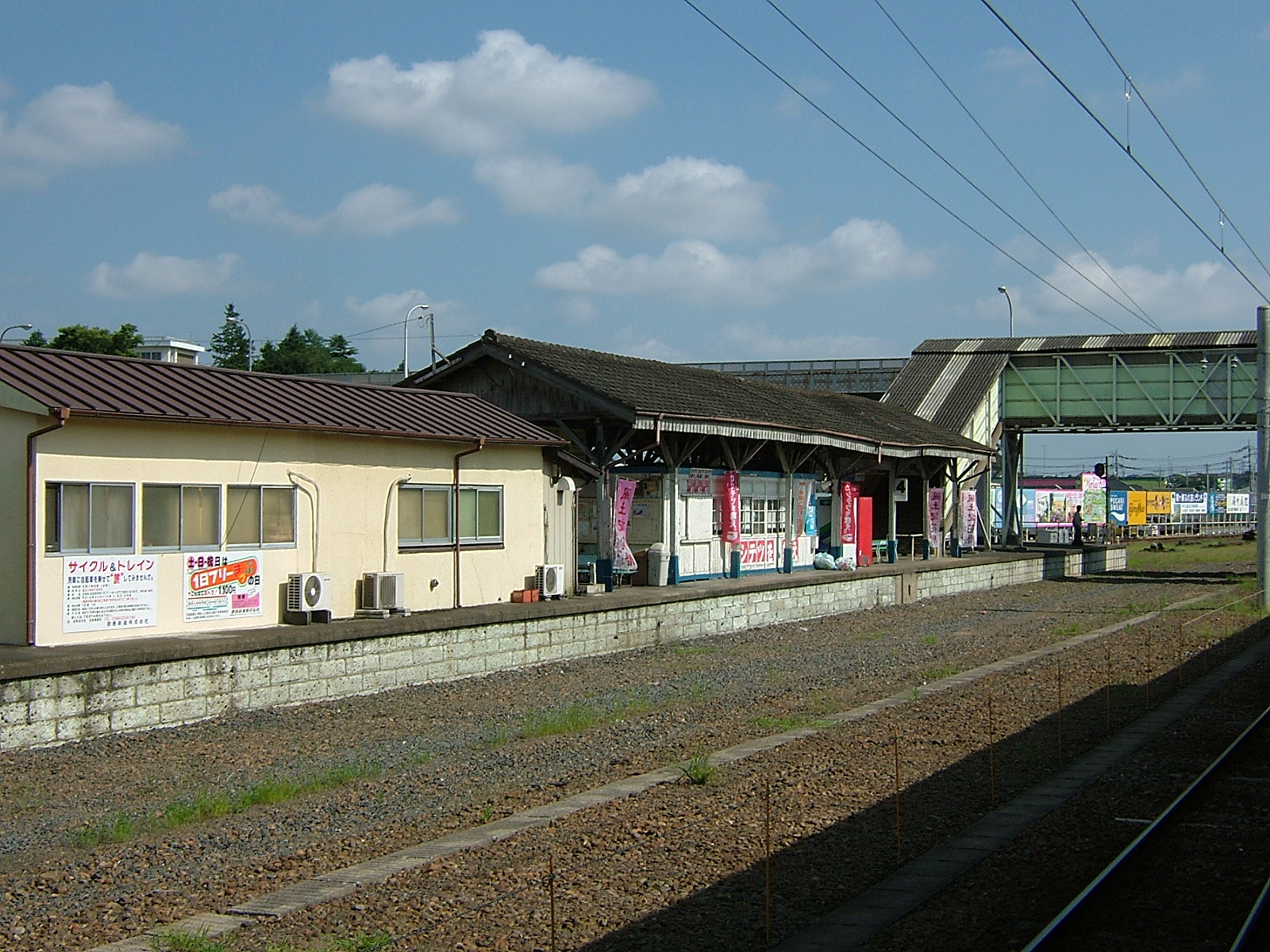 鹿島鉄道石岡駅プラットホーム